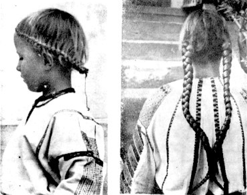 Împletire rotundă (după cap) sau în două cozi.